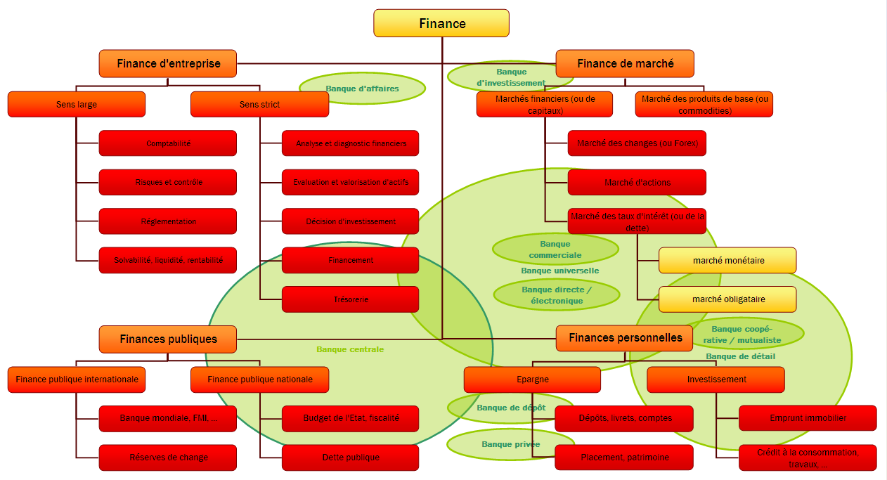 Schéma synoptique de la Finance, vue globale